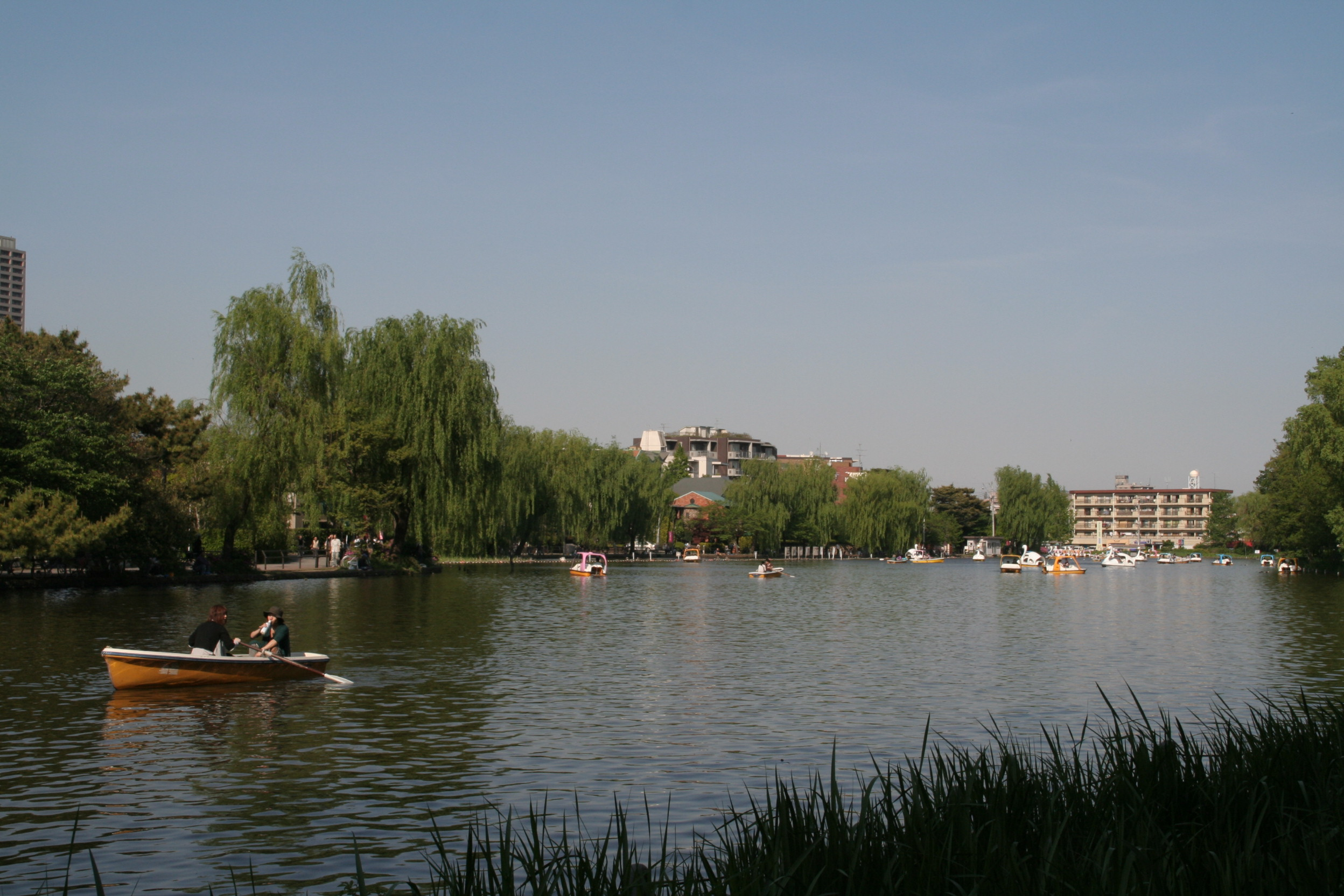 Shakujii Park boat pond